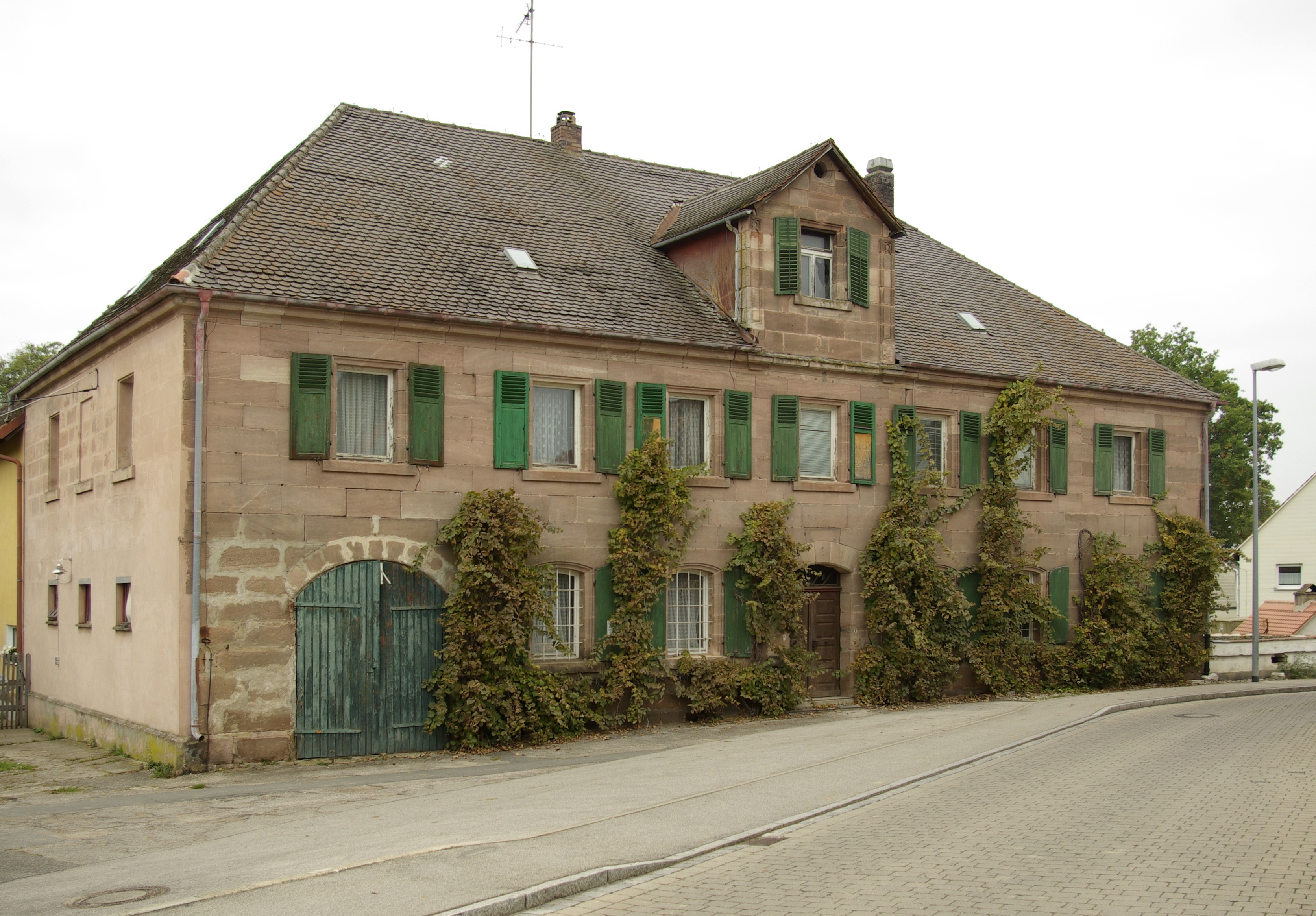 Am Wasserschloß 34 im Schwabacher Ortsteil Wolkersdorf.